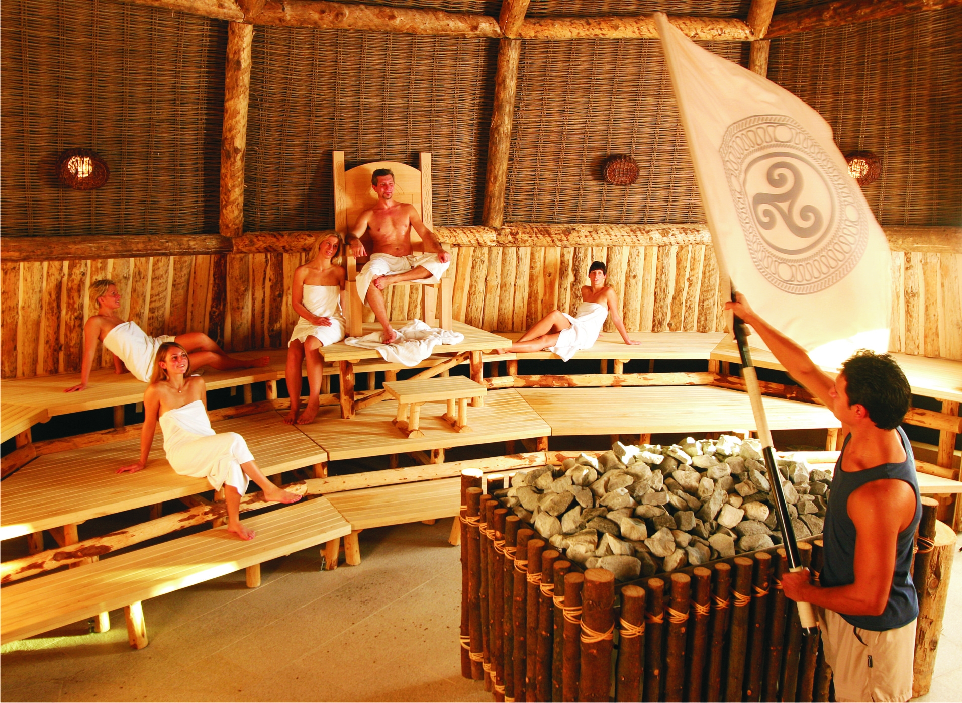 Keltenthron Sauna